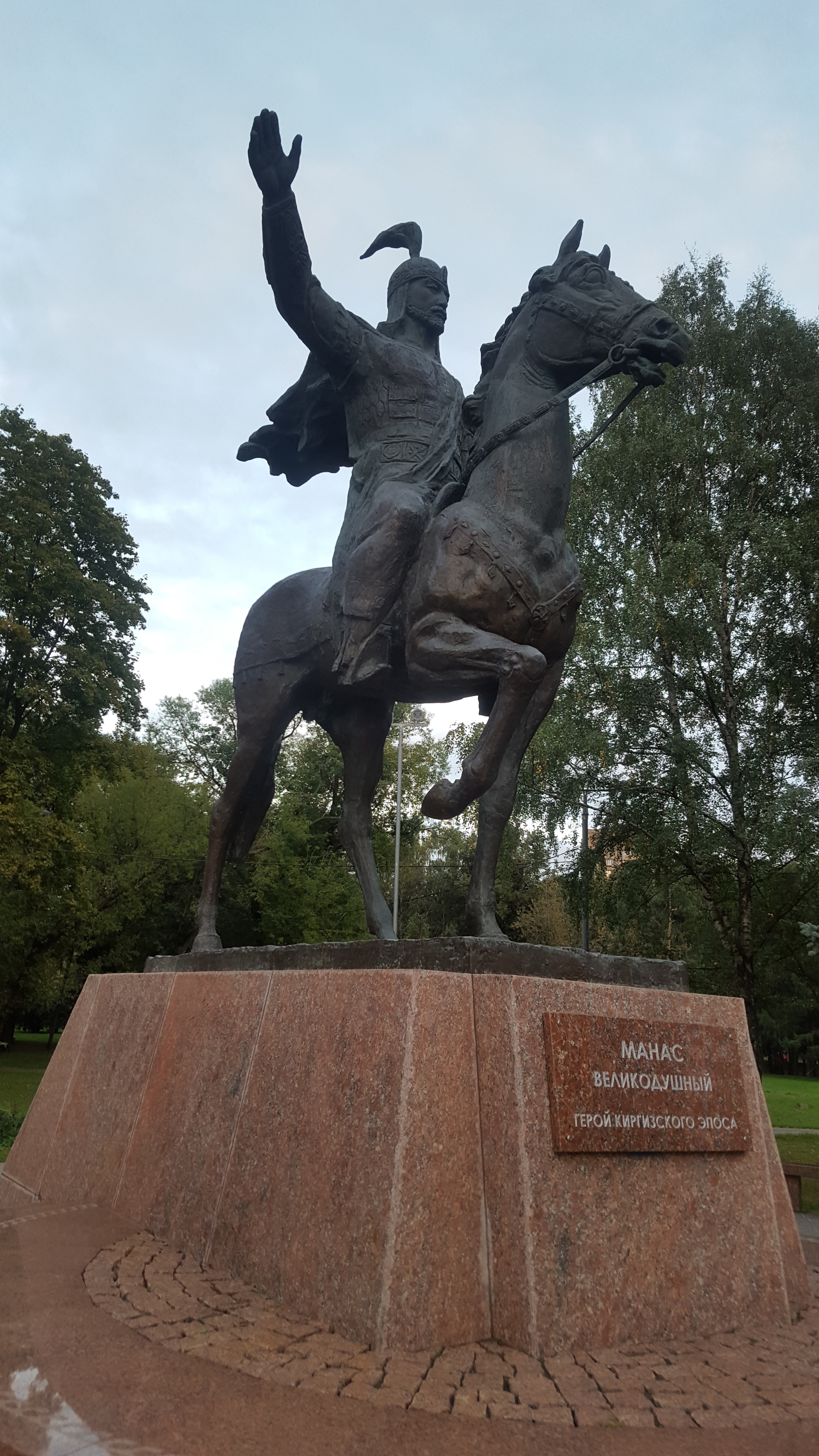 Парк Дружбы. Произведения монументальной скульптуры:: Ленинградское шоссе, на территории "Парка Дружбы", Левобережный, Северный округ, Москва